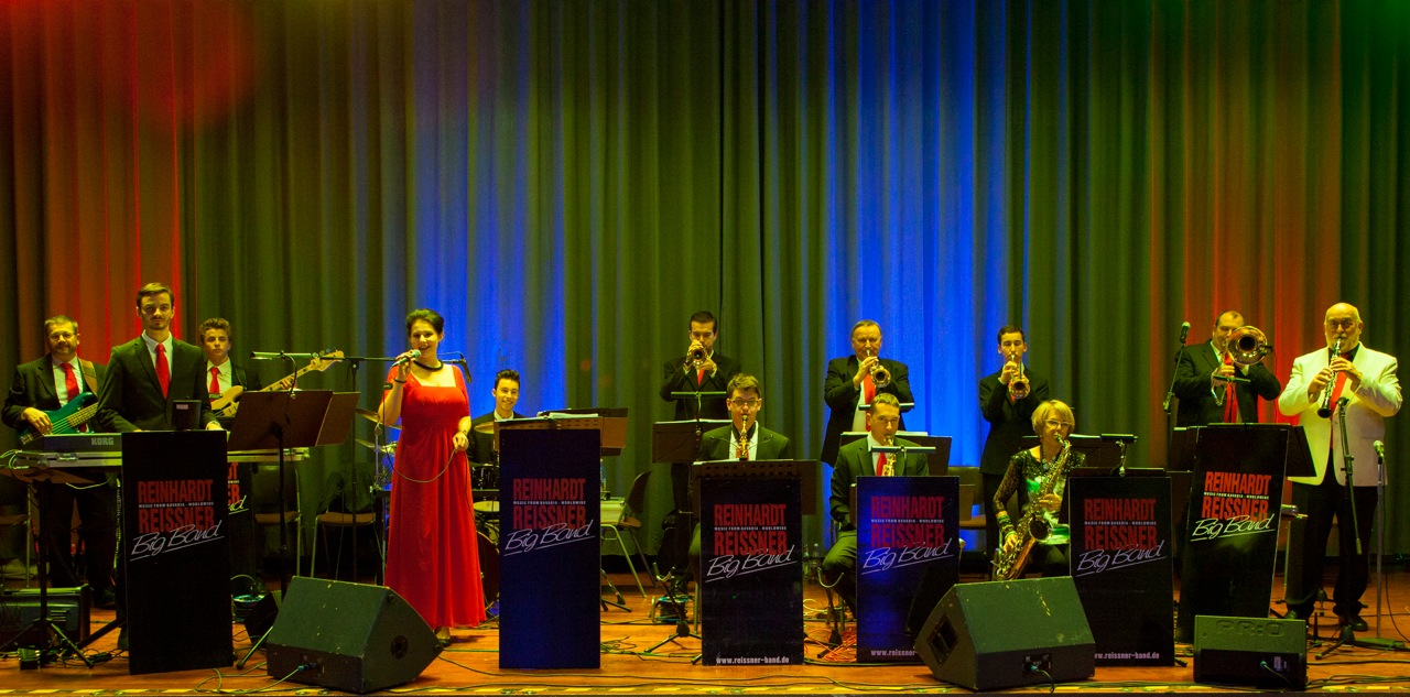 Auftritt der Band, Bühnenbild, Foto im Auftrag von Reinhardt Reissner, Bildrechteeigentümer Reinhardt Reissner (Lizenzfreigabe an Wikipedia geschickt)